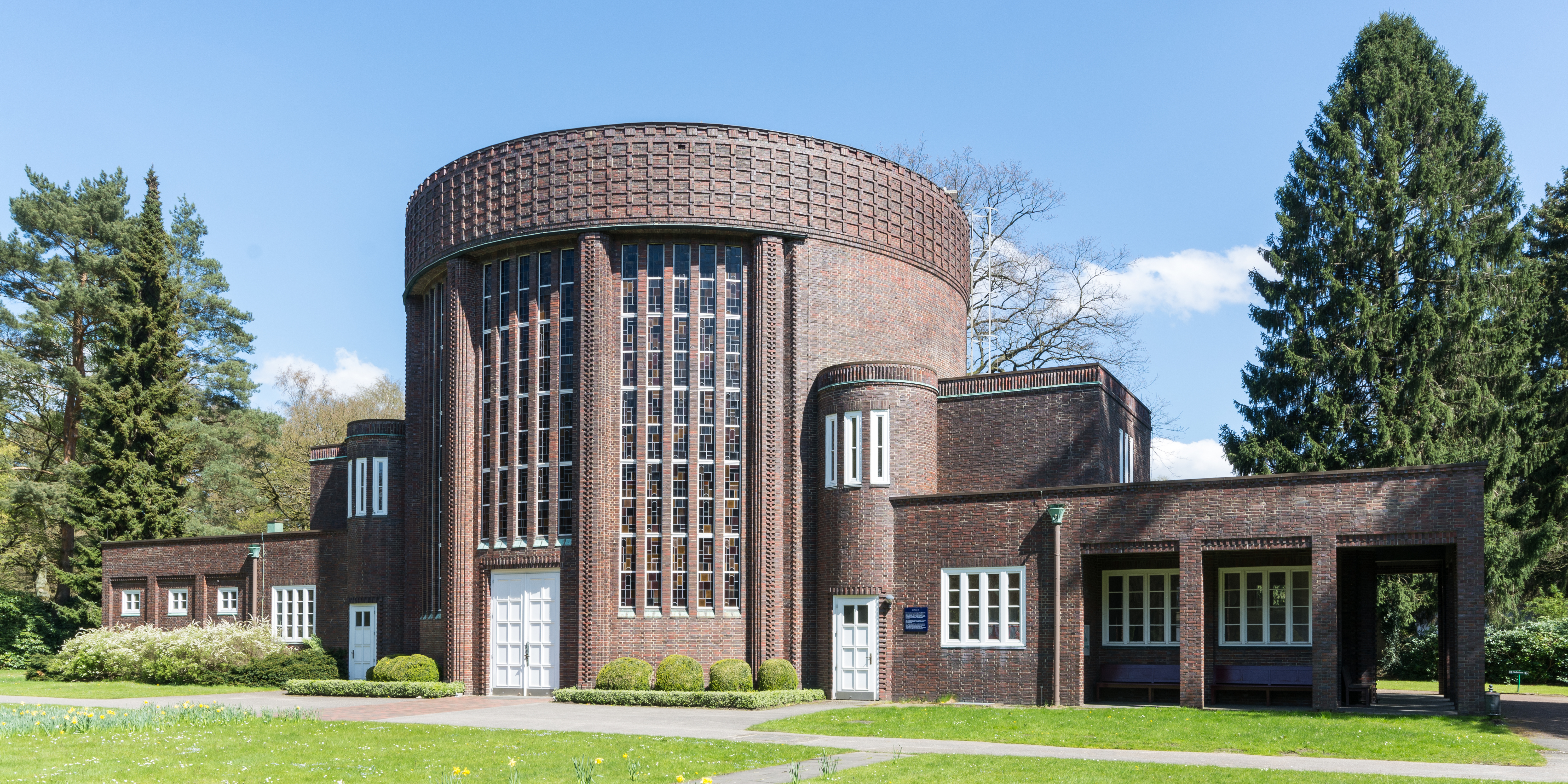 Kapelle 13 auf dem Friedhof Ohlsdorf in Hamburg. This is a photograph of an architectural monument.